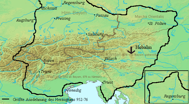 Lage der Hebalm im Gebiet des alten Bayern, Dokumentation der Zugehörigkeit zum Sprachgebiet